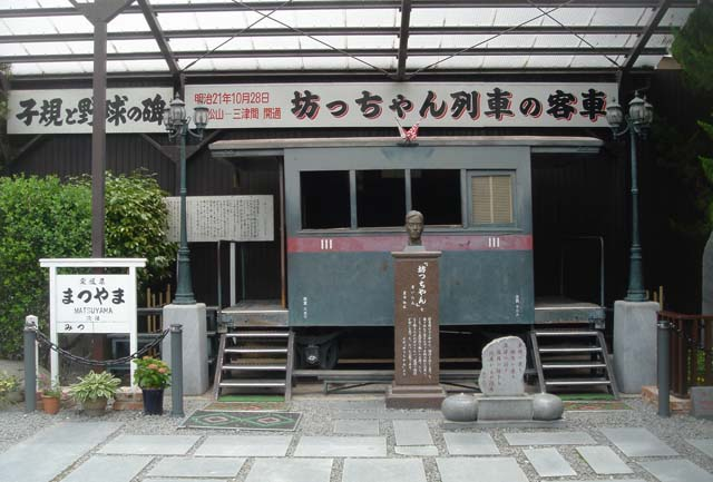 子規堂にて投稿者が撮影